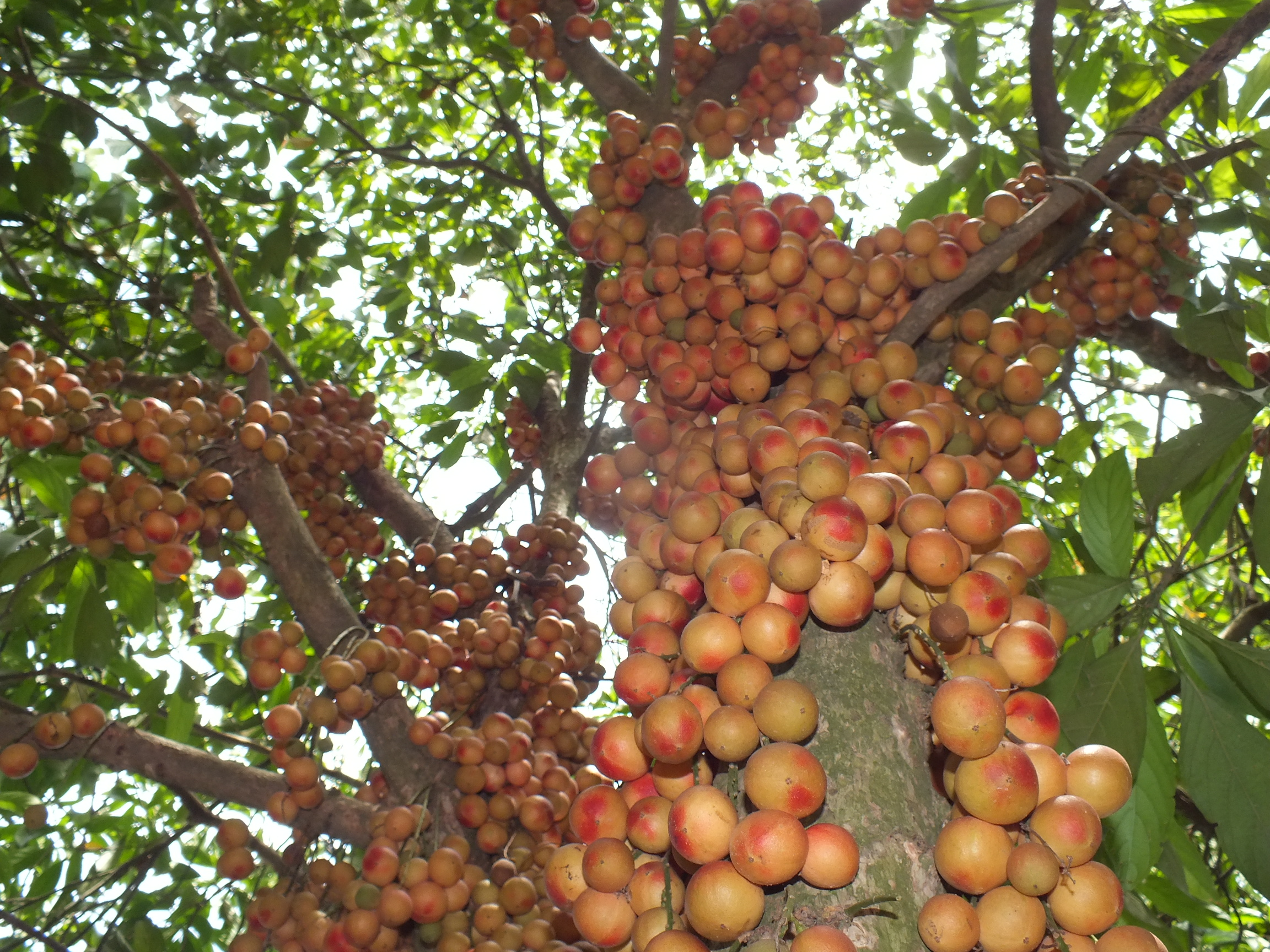 Baccaurea 木奶果属 Chi Dâu da in Hue-Vietnam